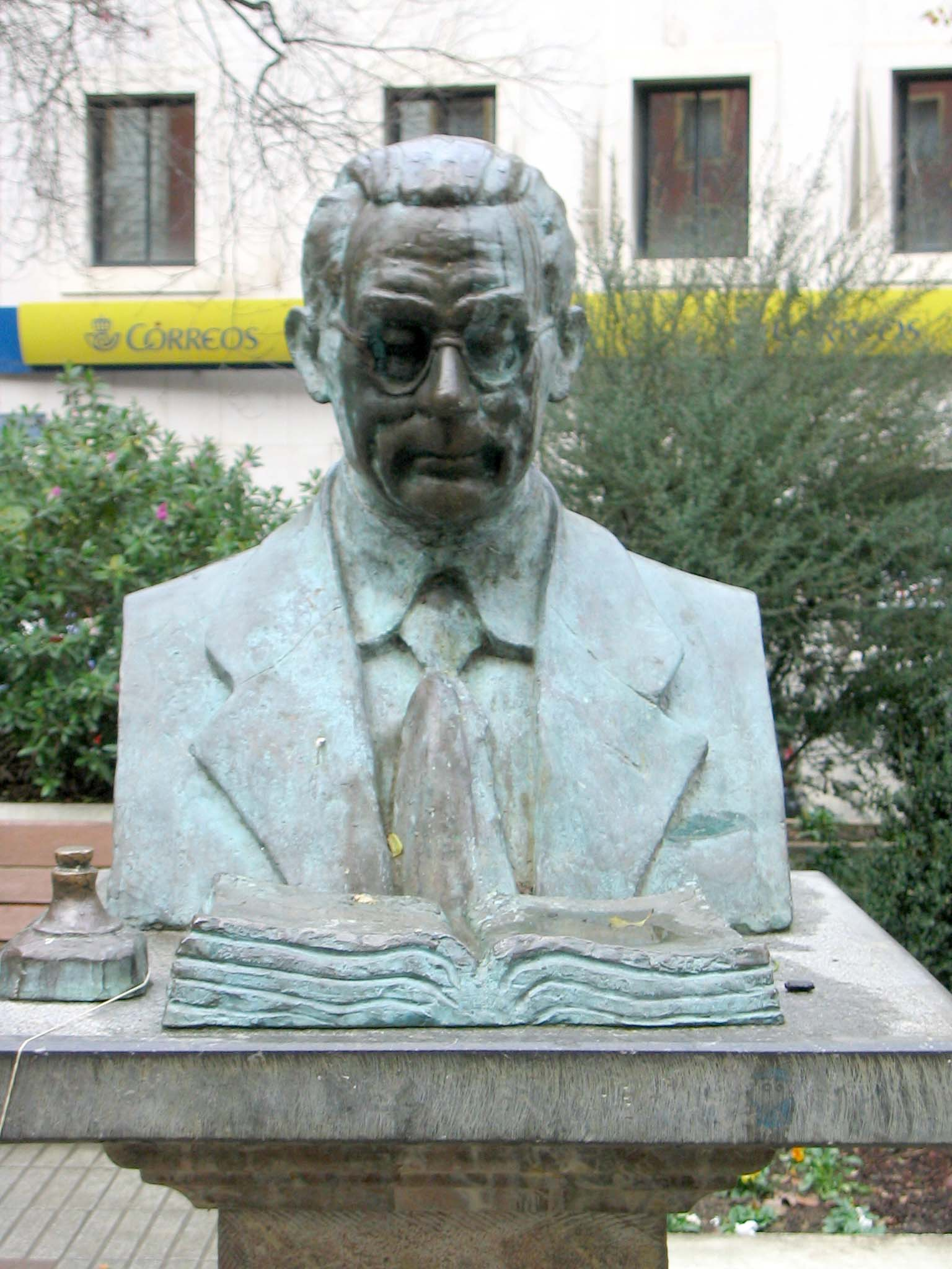 Toribio Echeverría, momumento en Éibar, Guipúzcoa (España).